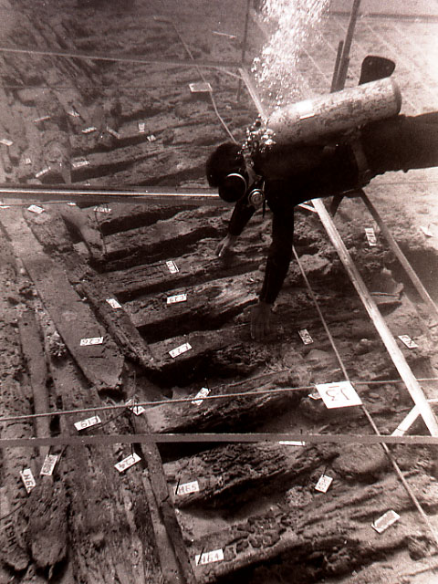 אבנר רבן בודק את חלקי העץ של הספינה ורשת הריבועים שהותקנה לצורך צילומי רצף